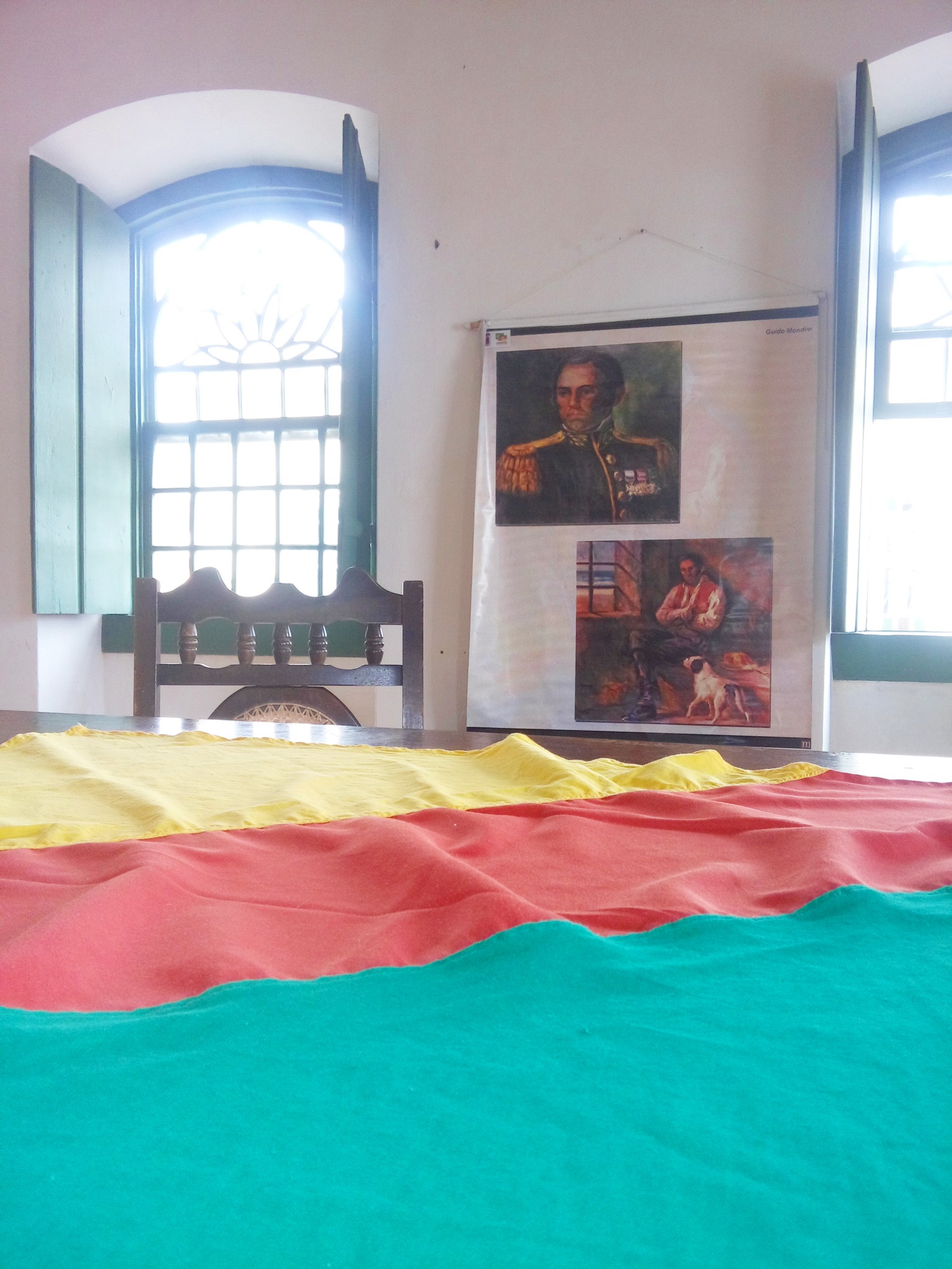 Bandeira Farroupilha pertencente ao acervo do Museu Histórico Municipal Barbosa Lessa